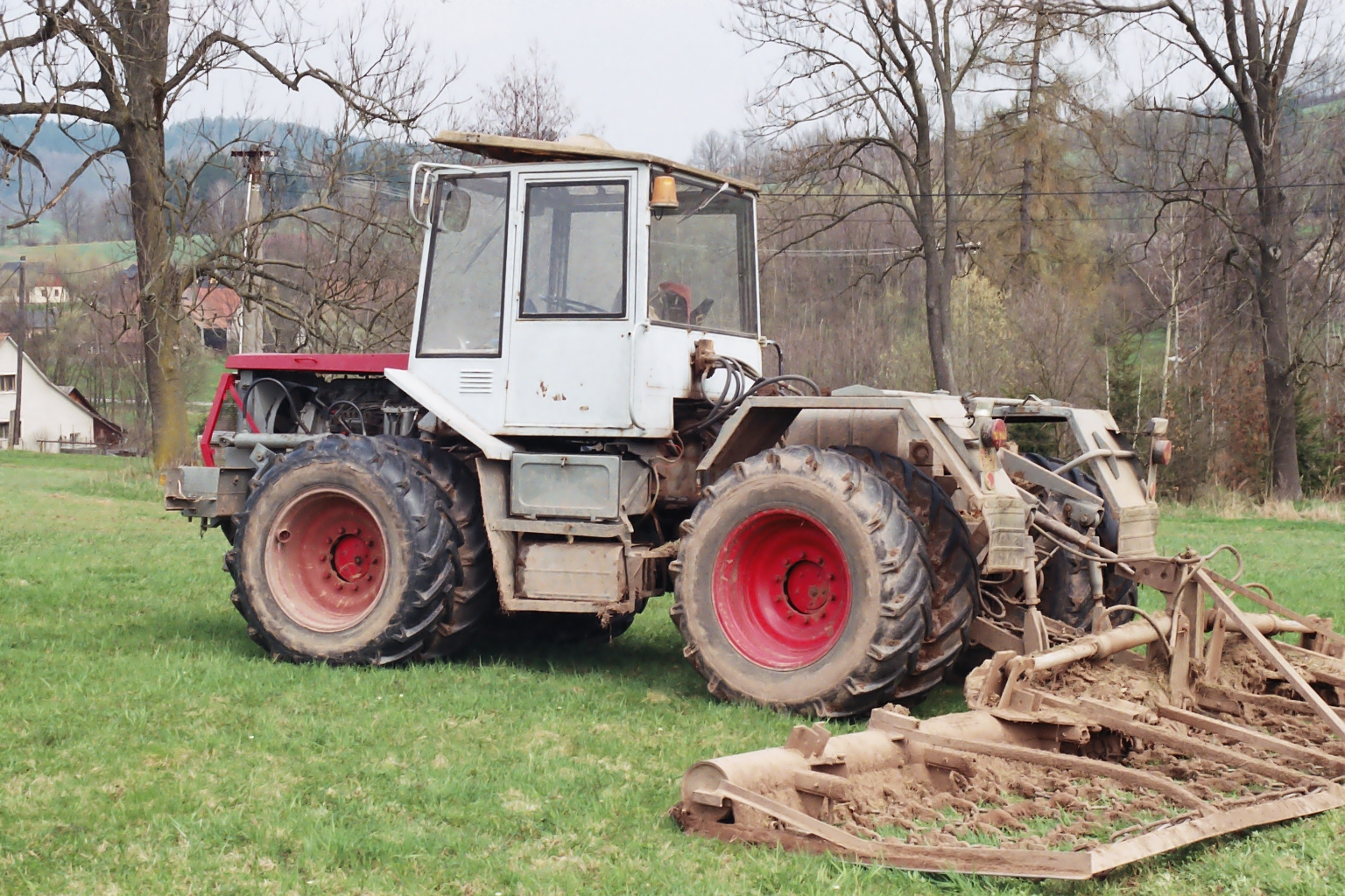 Zemědělský tahač (traktor) ŠT 180, výroba Československo 1968-92.